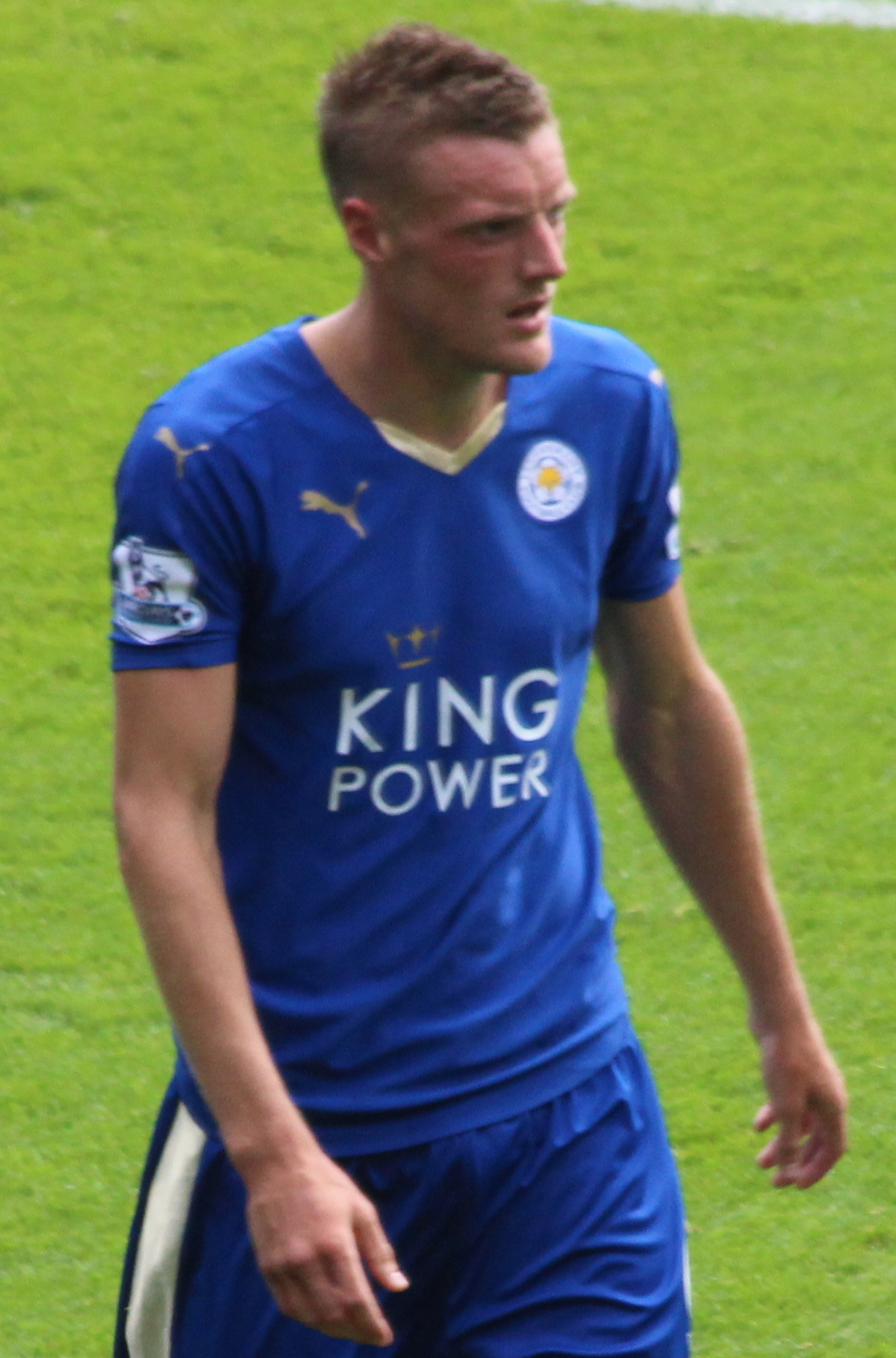 Leicester City vs Sunderland 4:2